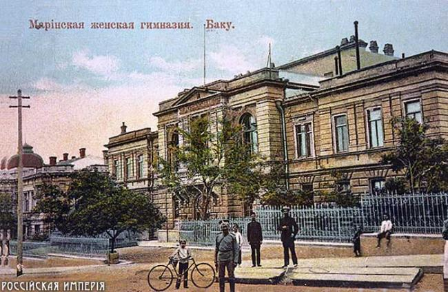 Открытка. Мариинская женская гимназия в Баку.